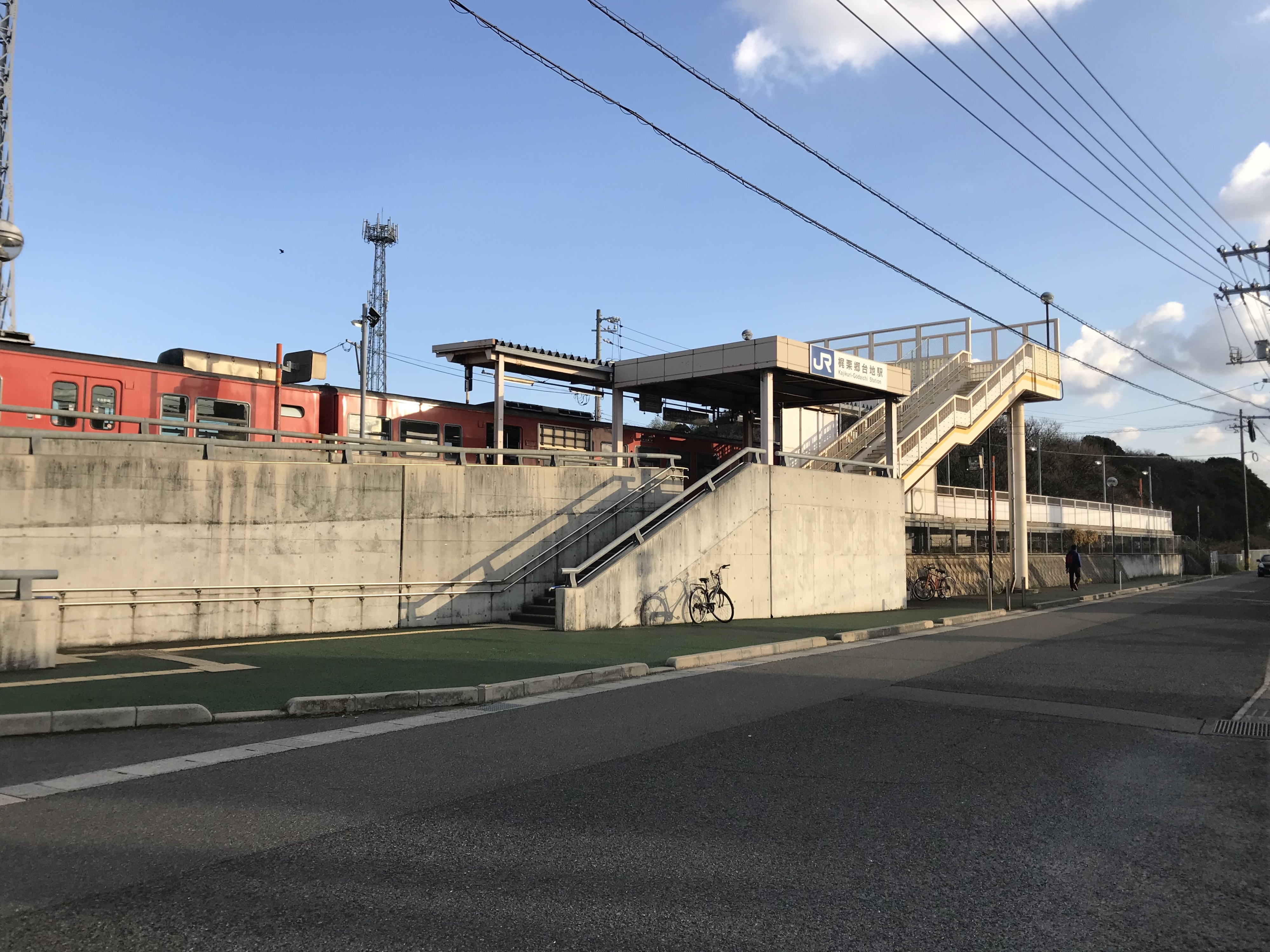 梶栗郷台地駅の駅舎